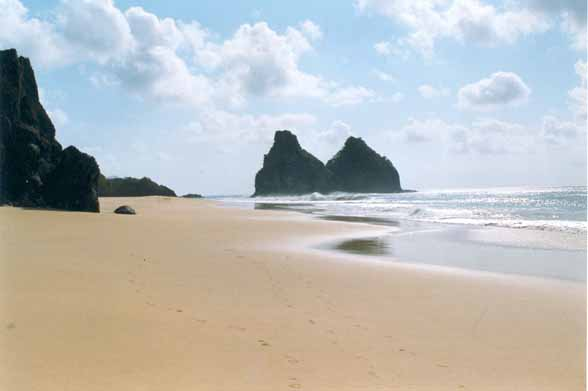 Fernando de Noronha 1997